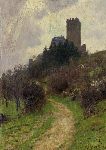 Burg Kerpen, Öl auf Leinwand, 53,5 x 36,5 cm, signiert, betitelt und datiert »F. v. Wille Kerpen 18.4.24«